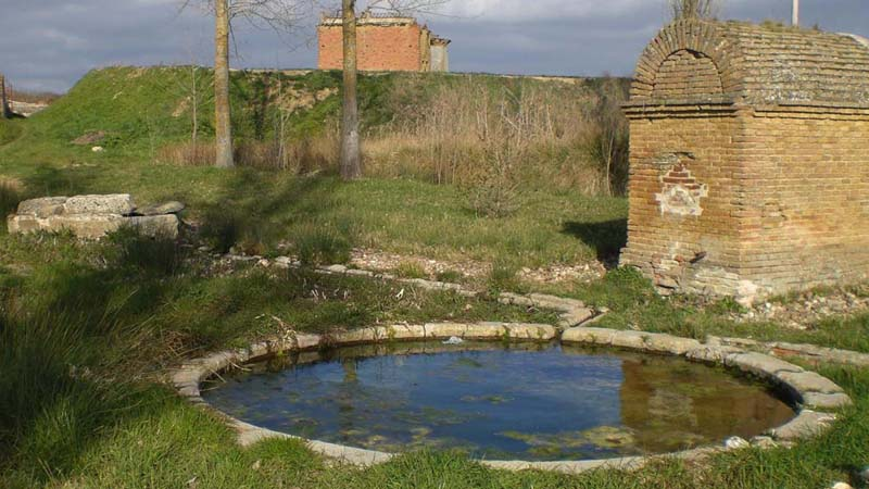 Fuente romana, pilon circular romano y fuente mudejar situadas en Arconada, Palencia, España